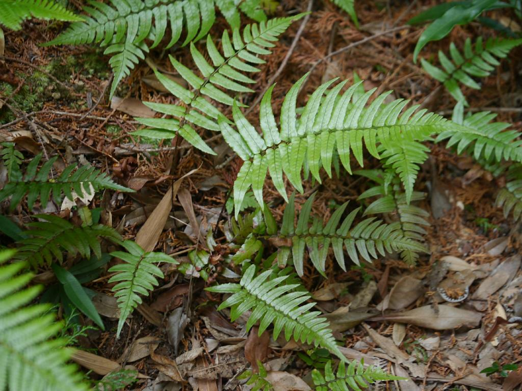 2016/02/28 和歌山県田辺市：Tanabe City. Wakayama Pref. Japan